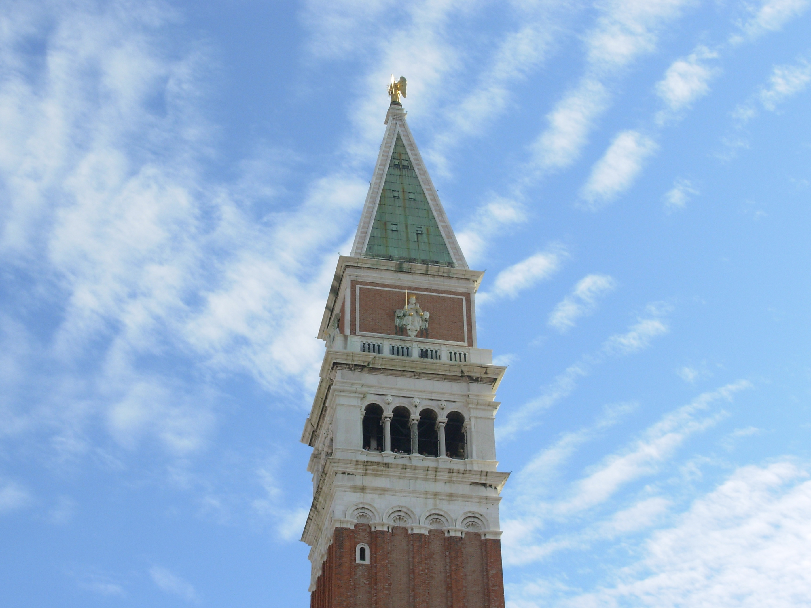 Fotografijo sem posnela sama, poleti 2007 - vidi se zvonik, ki je postavjen na trgu sv. Marka (Bell Tower).